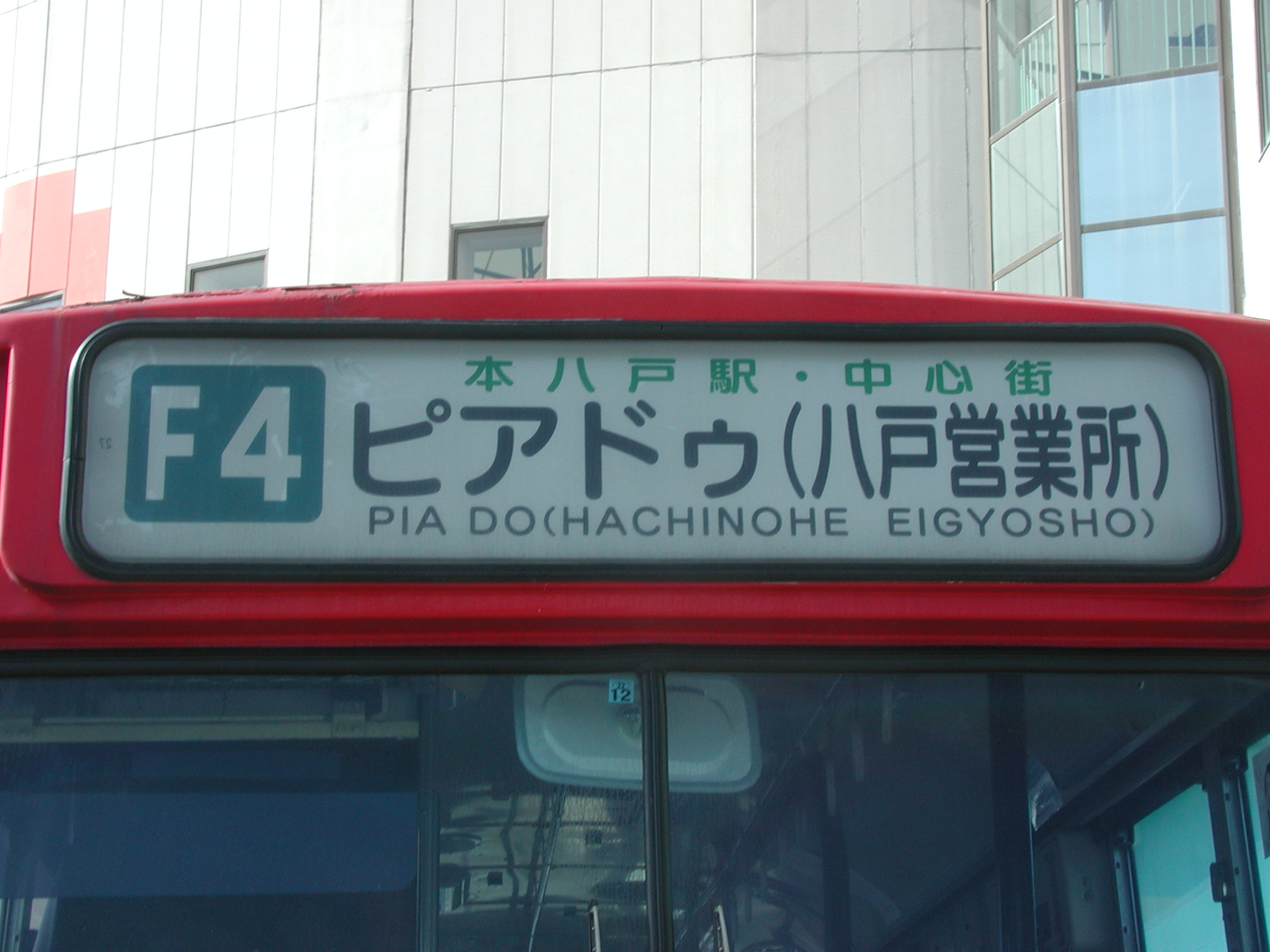 南部バス 行き先表示方向幕（白幕式）：2010年4月版